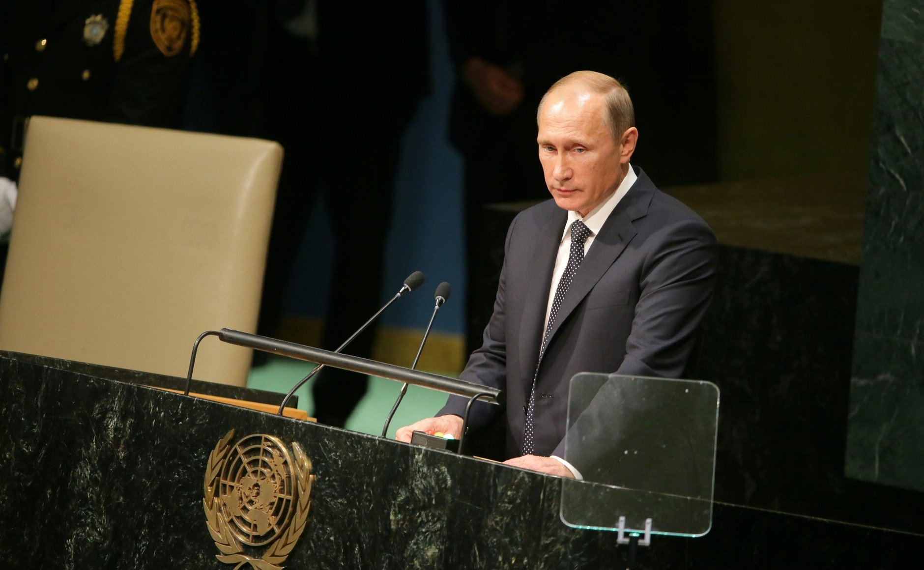 Выступление Президента России Владимира Путина на пленарном заседании 70-й сессии Генеральной Ассамблеи ООН